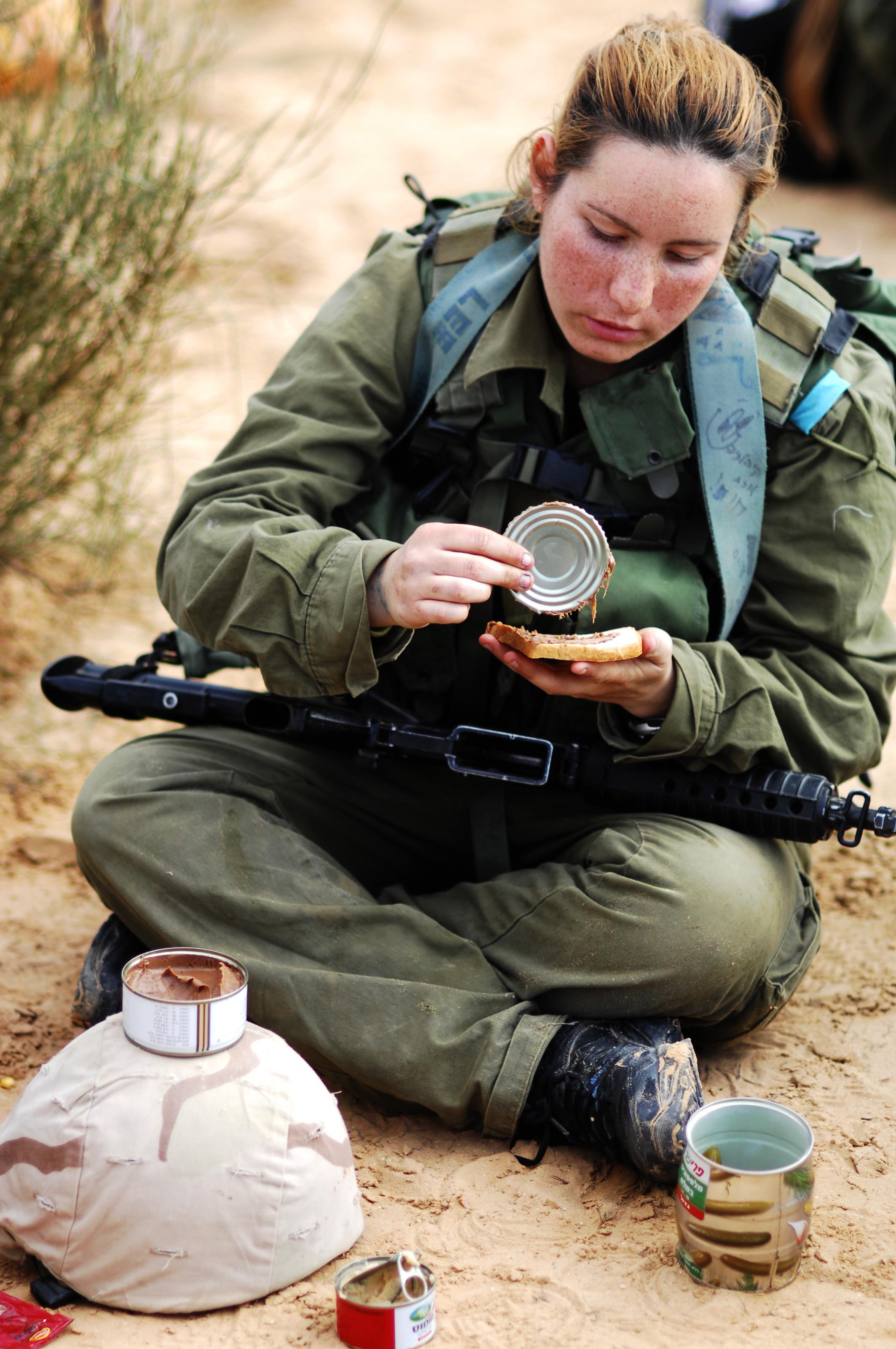 January 03, 2007. A starting class of the Nachshol Reconnaissance Company is comprised of almost 40 female combat soldiers. "It's an infantry unit like any other," said the former Company Commander, Captain Shirli Galez. "They have all the equipment required to conduct reconnaissance and observation operations in the field. This company proves that female soldiers can carry the weight of combat positions fully." פלוגת נחשול, פלוגת הלוחמות של גדוד נשר, מורכבת מכמעט 40 חיילות. "זו יחידת חי"ר מיוחדת במינה," אמרה מפקדת הפלוגה לשעבר, סרן שירלי גלז. "יש להן את כל הציוד הדרוש לערוך סיורים ומבצעי איסוף בשטח. הפלוגה הזו מוכיחה שחיילות מסוגלות לשאת את מלוא הנטל של תפקידים קרביים."